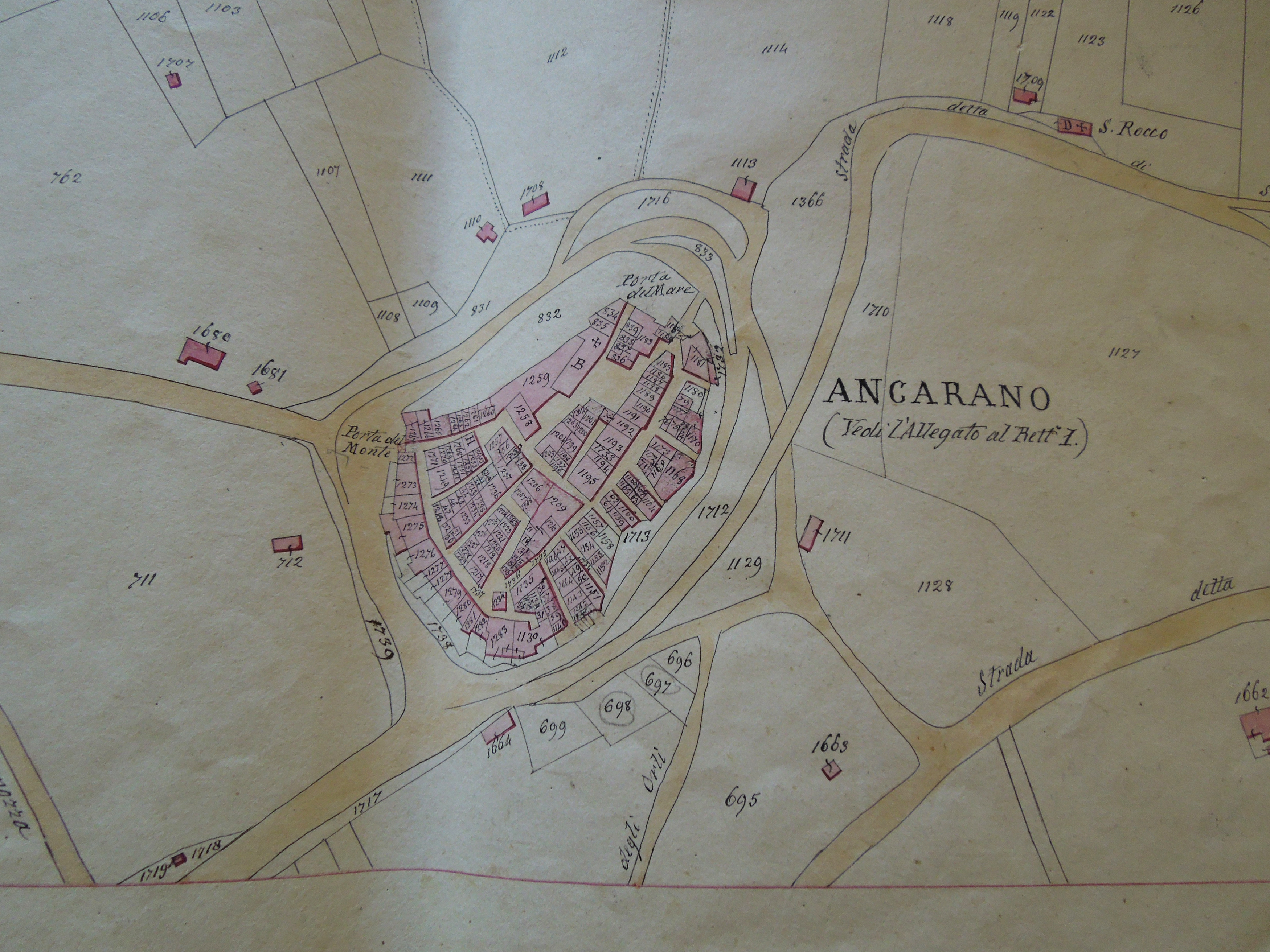 Particolare della rappresentazione delle particella del paese di Ancarano, Foglio IX, della Mappa del Comune di Ancarano nel Circondario di Teramo, Provincia di Abruzzo Ultra Primo, datata 12 giugno 1883 e sottoscritta dal dirigente dell’Ufficio tecnico di Finanza ingegner Bonomi, copiata da quella aggiornata dall’ingegner Alessandro Imperiali nell’anno 1882 e conservata presso l’Archivio di Stato di Teramo, collocazione: Catasto di Ancarano, Cartella Mappe, Volume 2/189. Un sentito ringraziamento ad Enrico Cannella, Funzionario Bibliotecario dell’Archivio di Stato di Teramo, che mi ha seguito nella ricerca di questa documentazione ed ha acconsentito allo scatto di questa immagine.